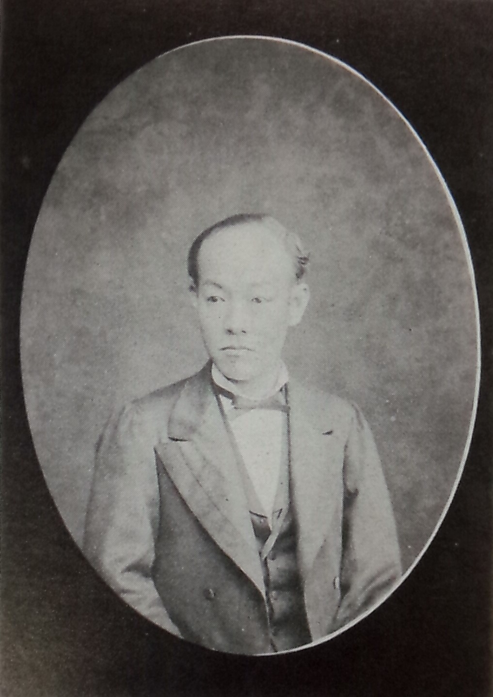 五辻安仲の肖像写真。